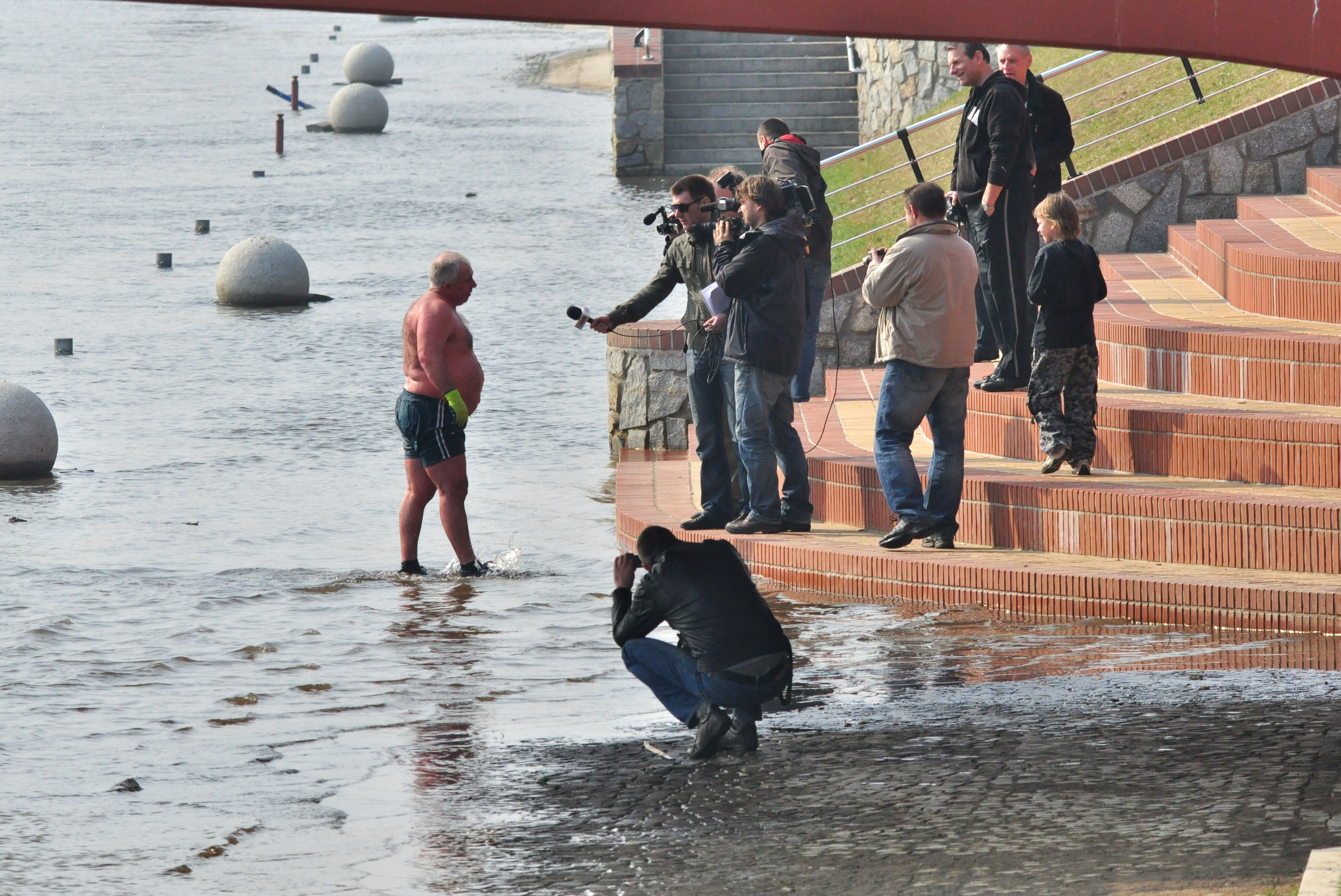 Dziennikarze przeprowadzają wywiad z pływakiem